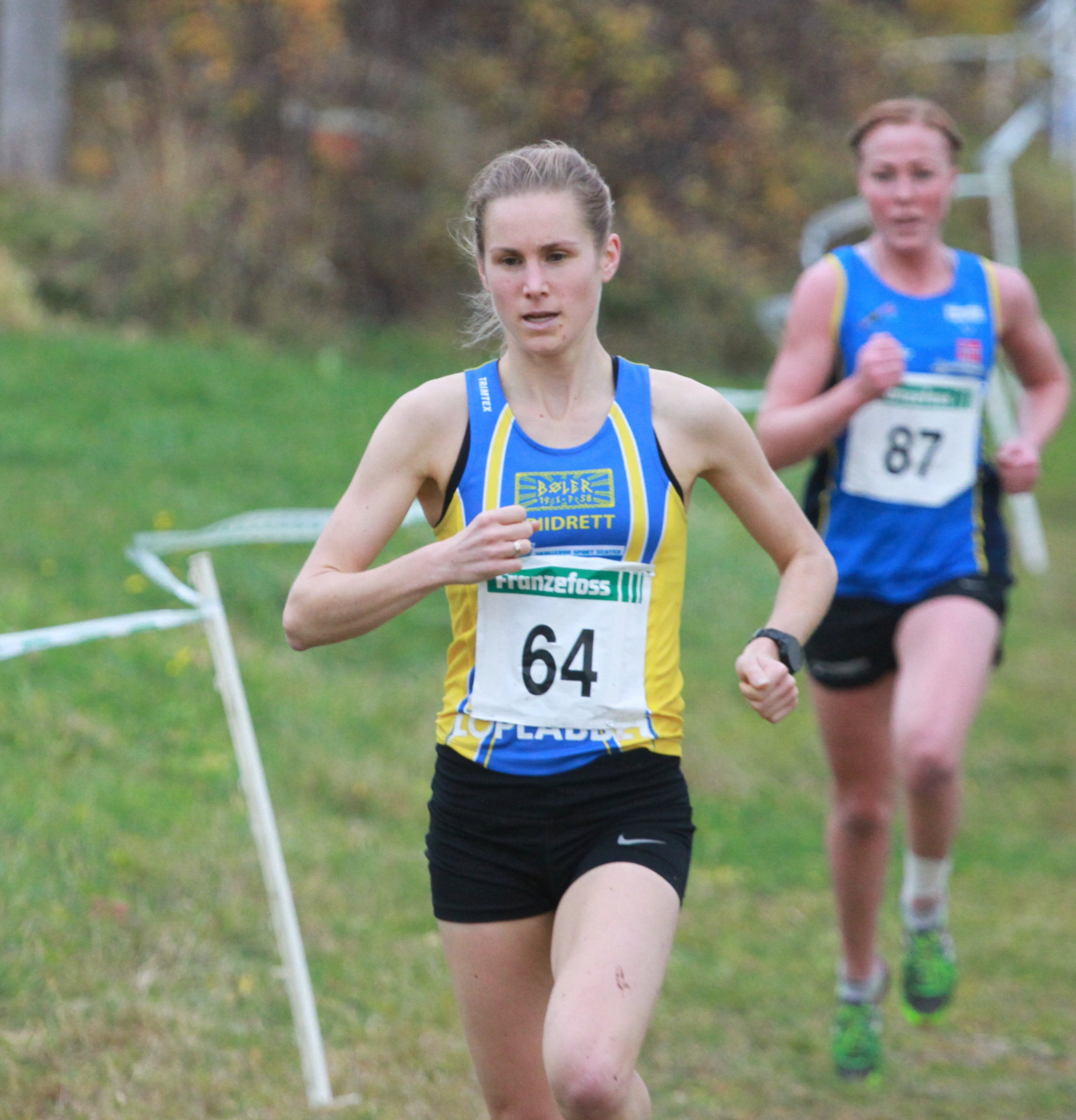 Heidi Pharo under NM i terrengløp i 2018.